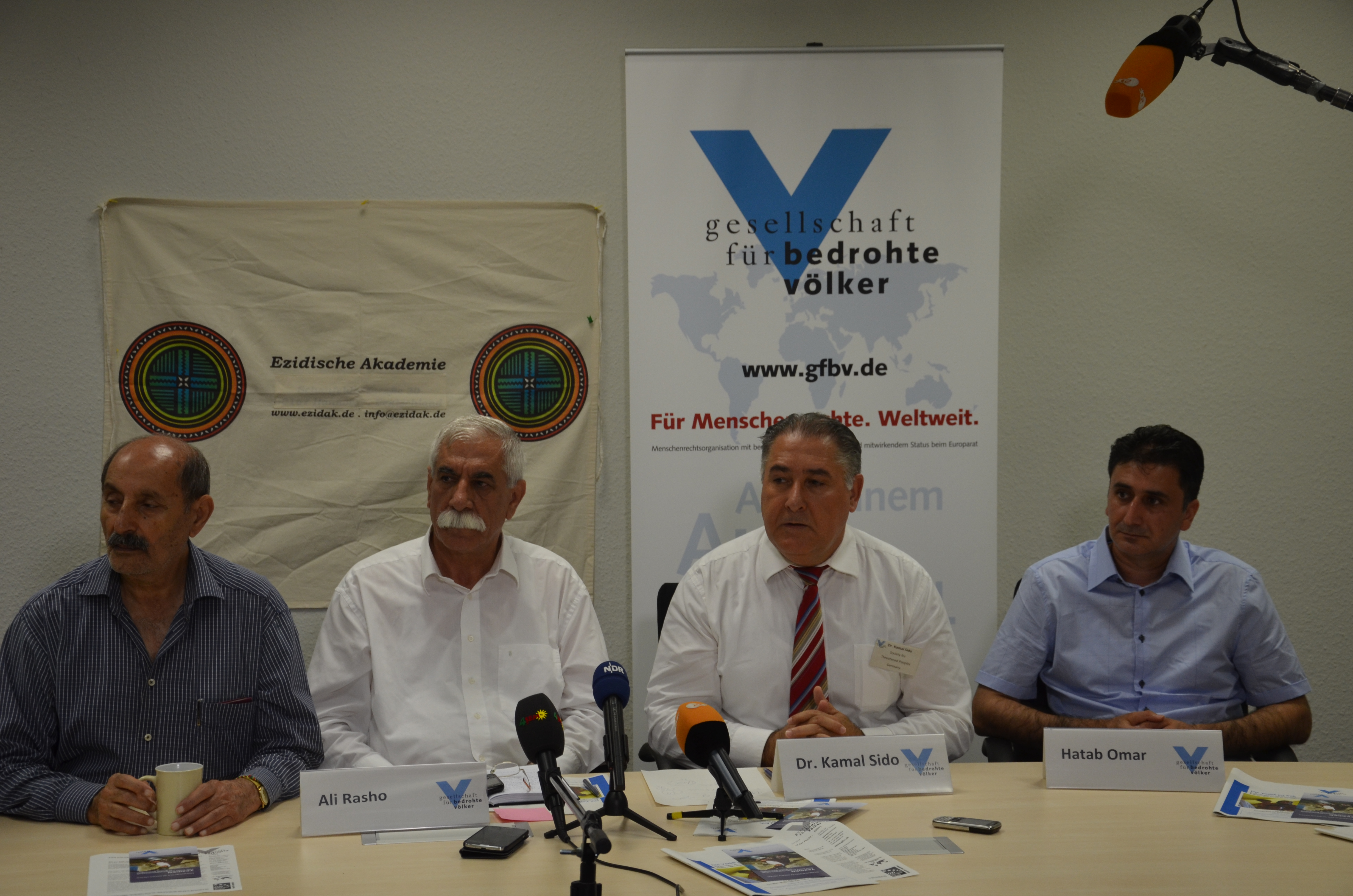 Aufgrund der Anfang August 2014 durch die ISIS-Extremisten eroberten Gebiete im Nord-irakischen Gebiet Sinjar waren etwa 200000 Eziden sowie andere religiöse Minderheiten in der Autonomen Region Kurdistan rund um Mossul auf der Flucht. Die Gesellschaft für bedrohte Völker sowie die Ezidische Akademie in Hannover befürchteteten einen humane Katastrophe und einen neuen Völkermord an den Mitgliedern ihrer und anderer Glaubensgemeinschaften. Am 5. August 2014 luden sie zu einer Pressekonferenz, in der Vertreter des öffentlich-rechtlichen Rundfunkanstalten sowie der Tagespresse erschienen ...